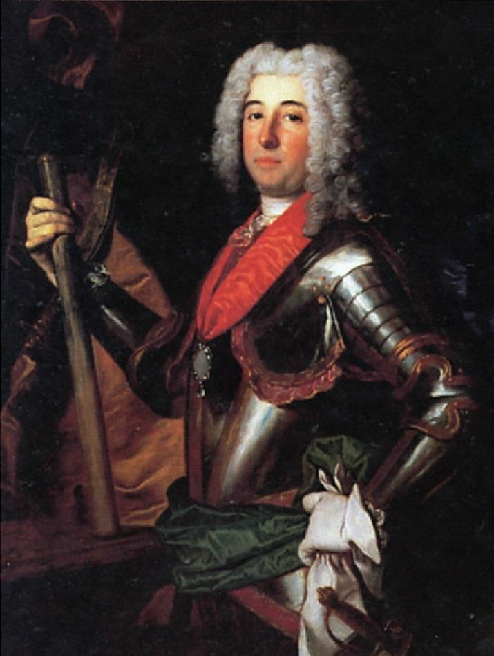 Infante D. António (1695-1757), irmão de D. João V.